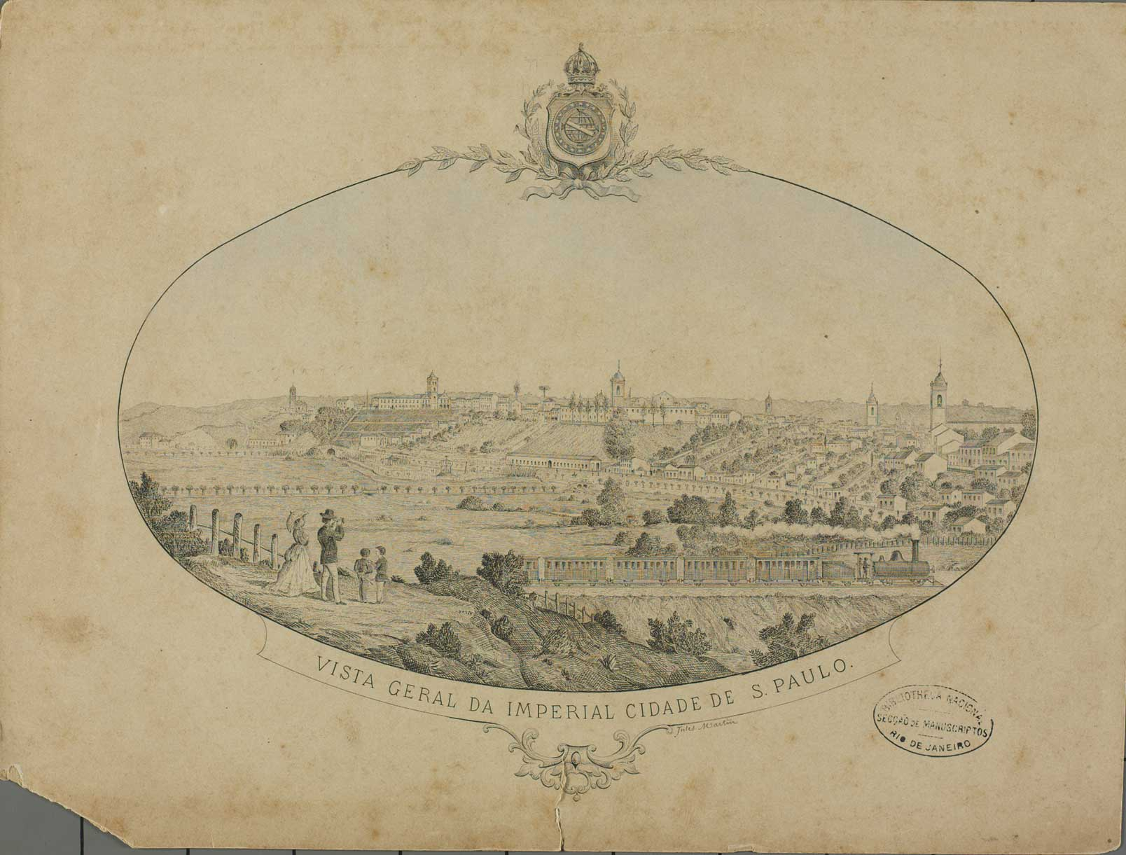 Vista geral da imperial cidade de São Paulo 21,5 x 26cm em papel 24 x 32cm Localização: Biblioteca Nacional (Brasil)